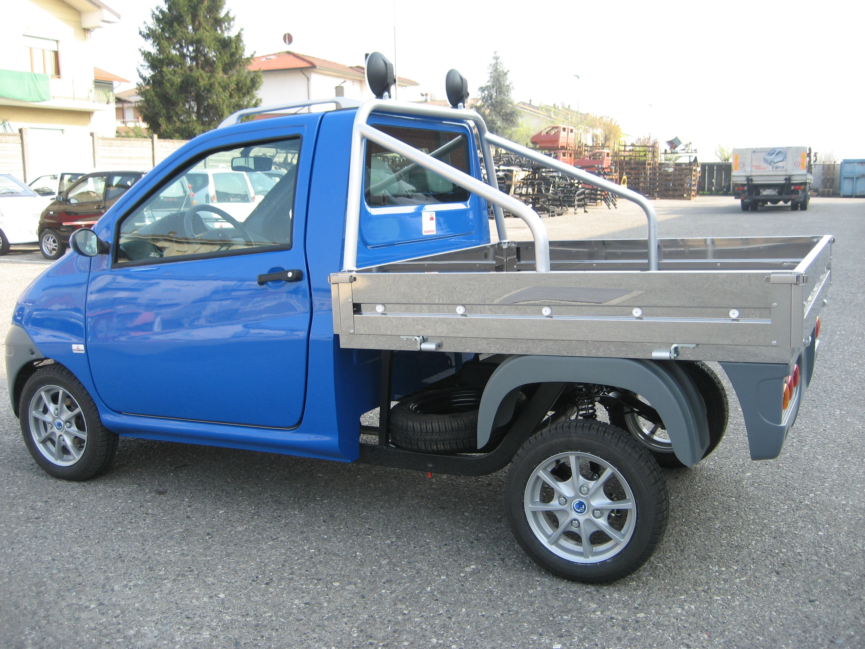 Mopedbil: Casalini Sulky. Casalini Sulky.